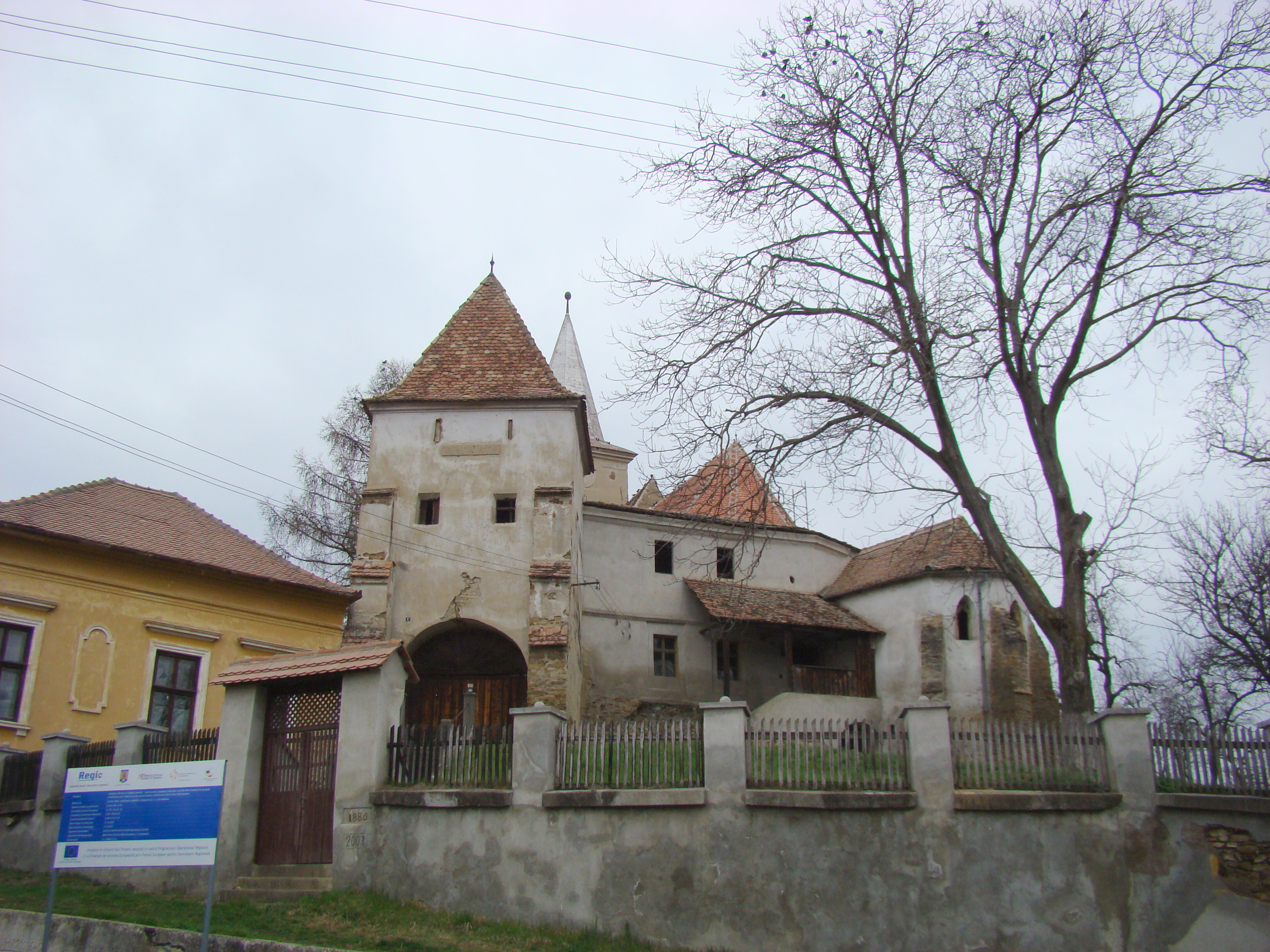 Ansamblul bisericii evanghelice fortificate, sat CURCIU; comuna DÂRLOS